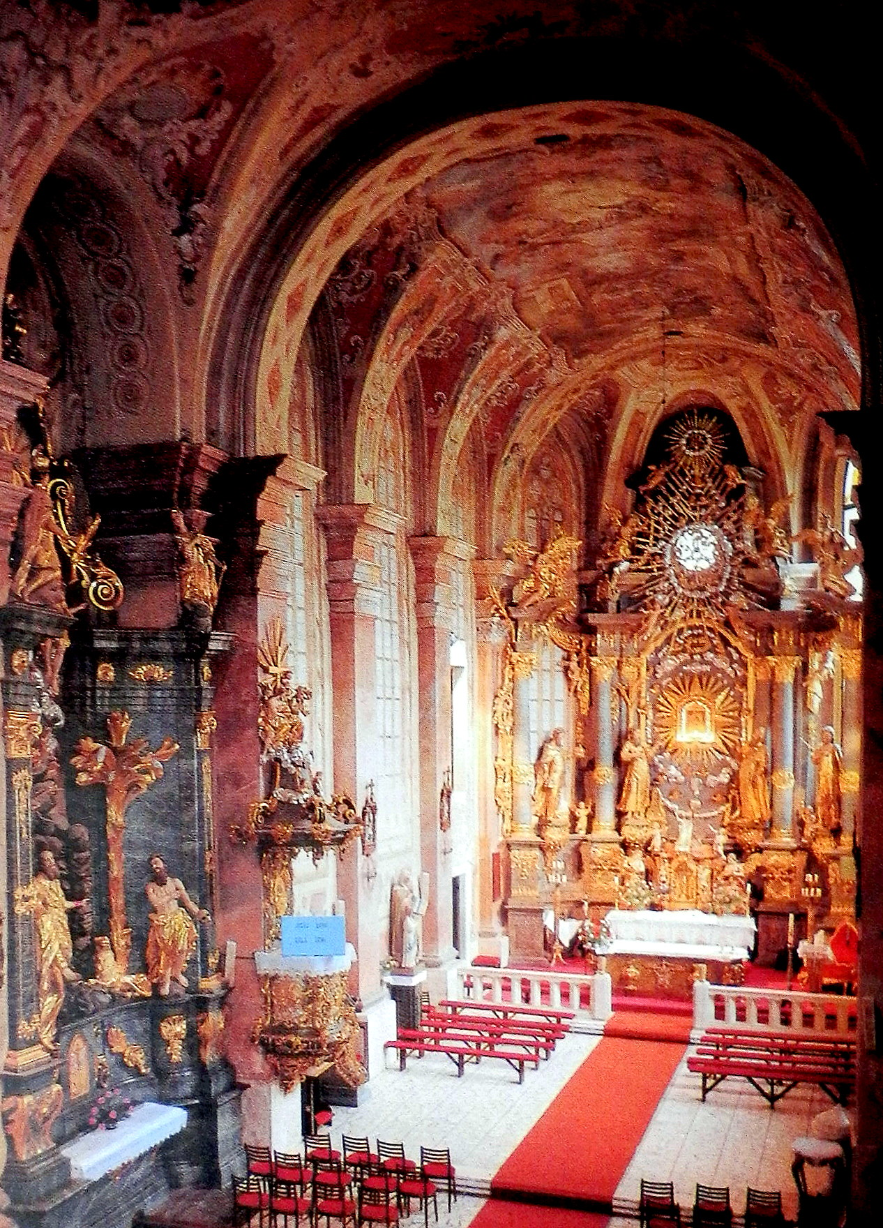 Interiér. Bazilika minor. kostol Narodenia Panny Márie Doba vzniku po 1441 Prevládajúci sloh gotika . Mesto Vranov nad Topľou. Slovensko